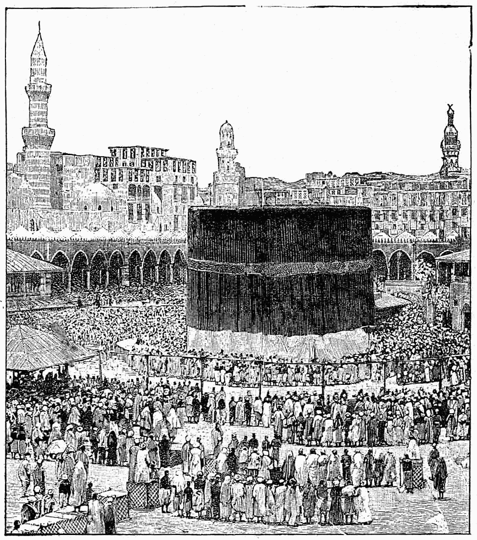 la mecque - la prière devant la kaaba dans la grande mosquée.